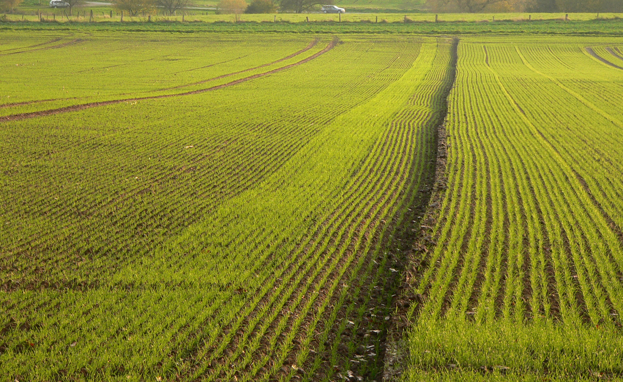 Wintergetreide